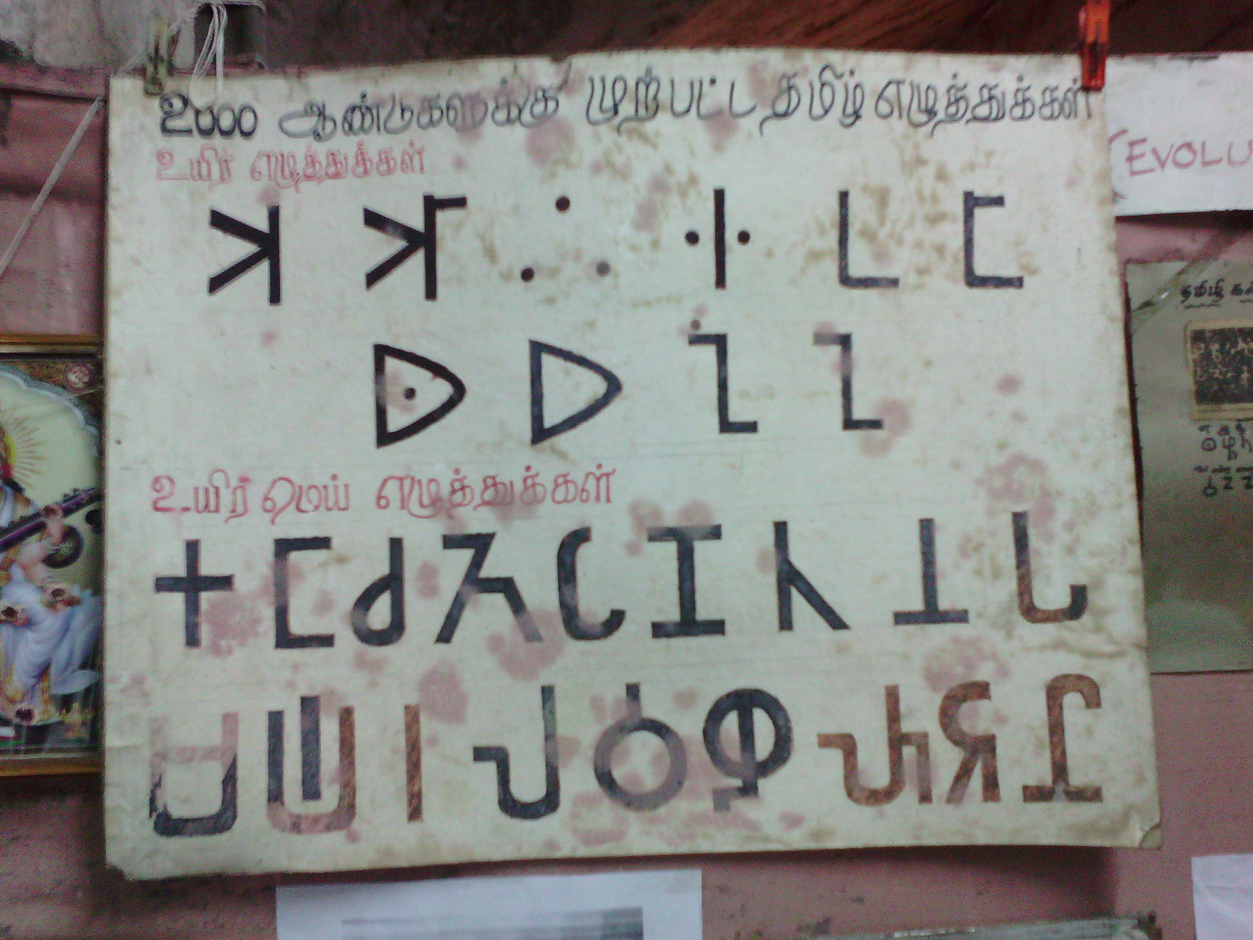 2000 ஆண்டுகளுக்கு முற்பட்ட தமிழ் எழுத்துக்கள், குற்றாலம் தொல்லியல் அருங்காட்சியகம்.